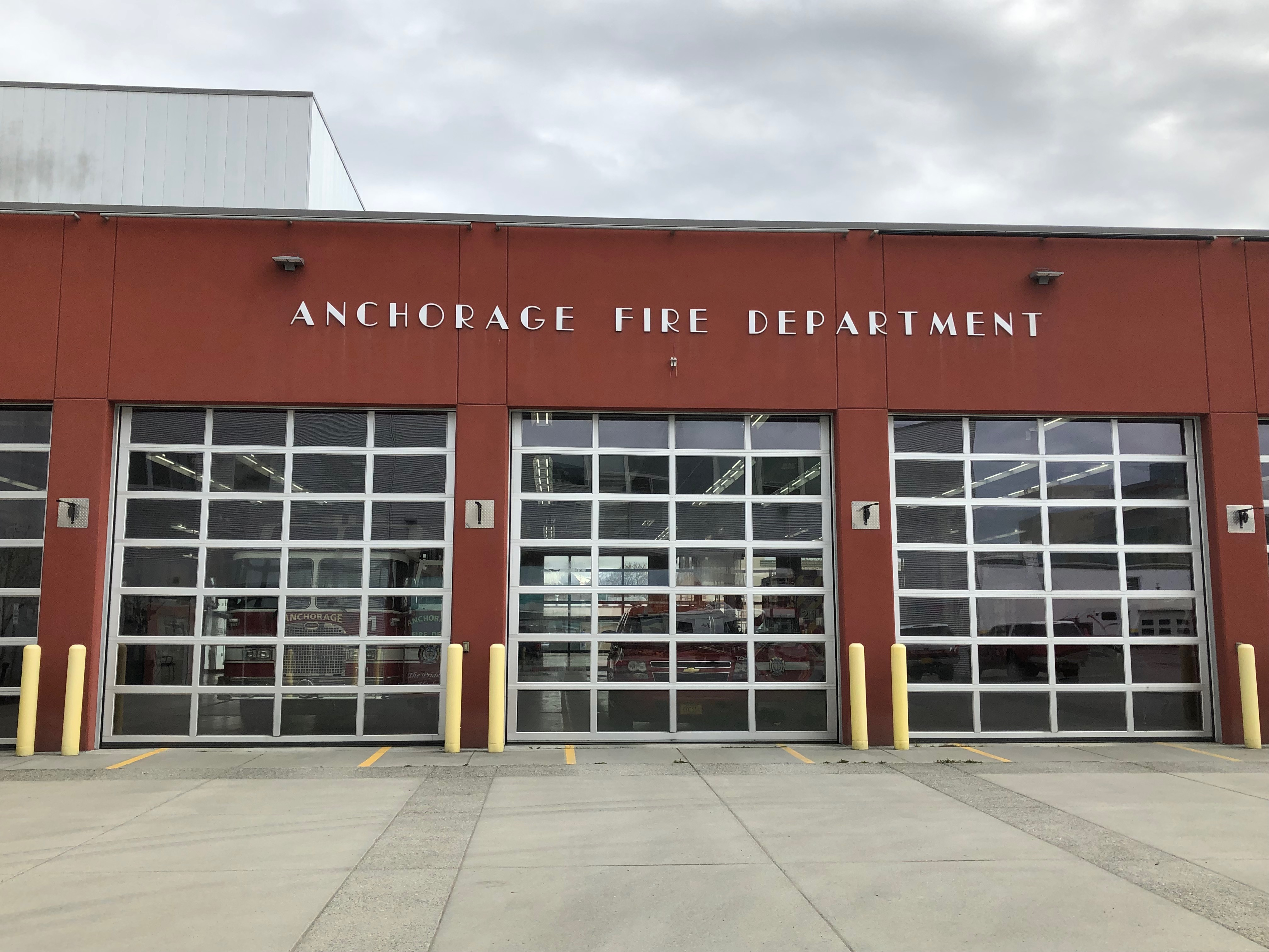 Anchorage Fire Department